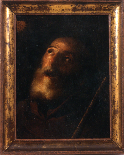 Situat actualment al museu de la Reial Acadèmia de belles arts de Sant Jordi